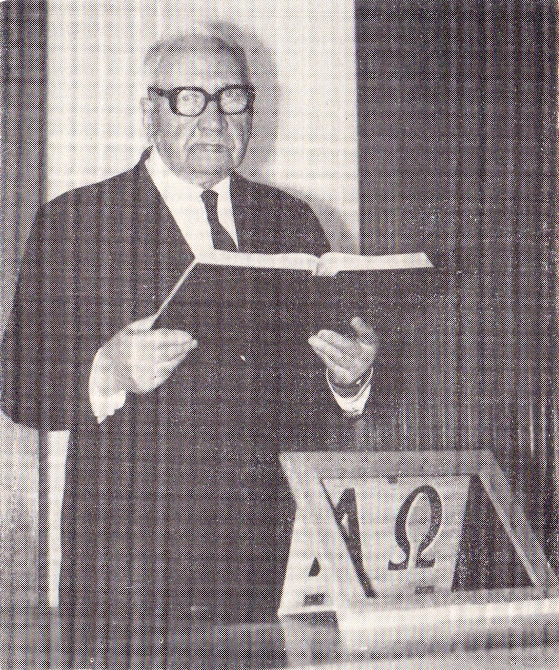 Stanisław Krakiewicz za Stołem Zborowym, w kaplicy przy ulicy Zagórnej 10 (1974)